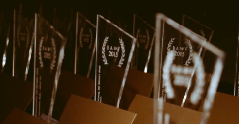 Entrega de premios 2015